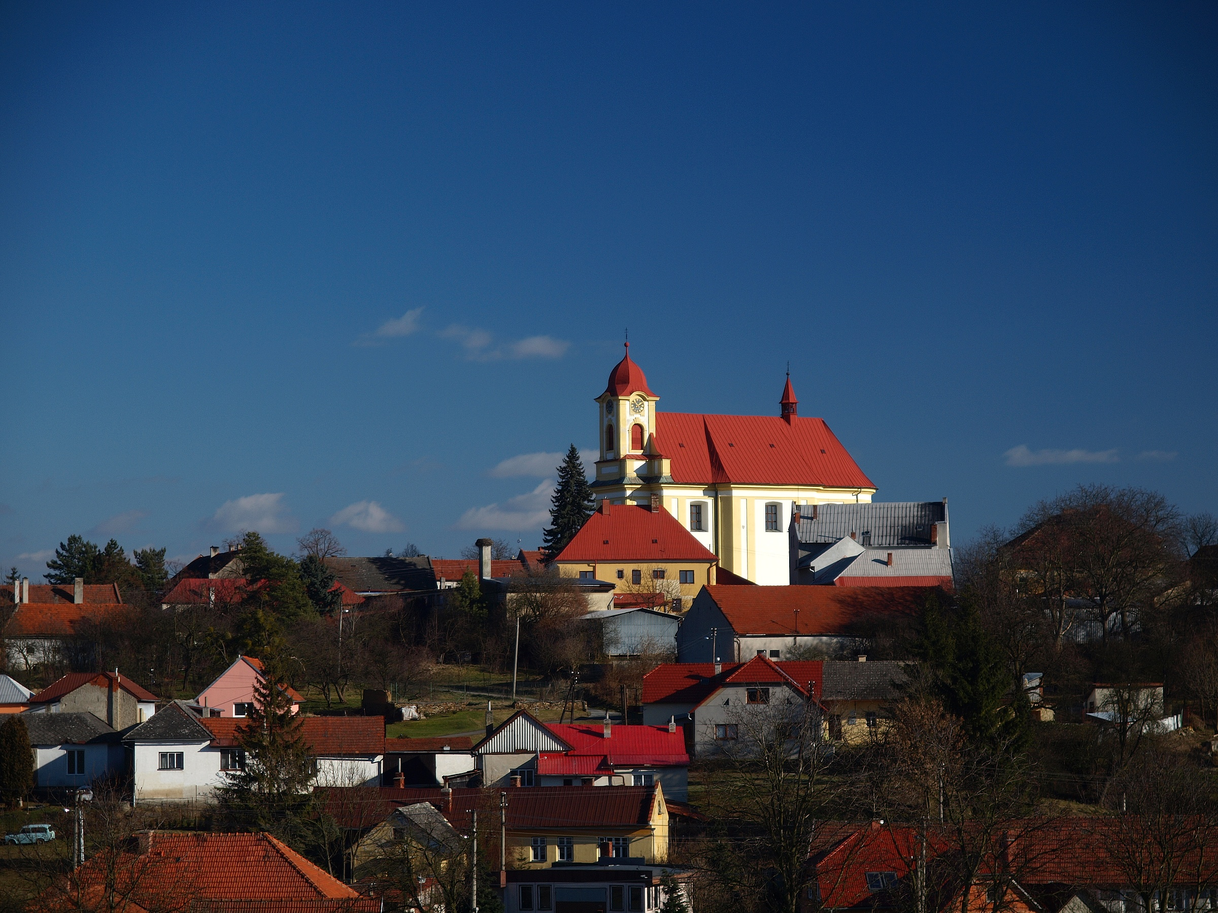 Kostel Nanebevzetí P. Marie (Soběchleby), horní část obce, Soběchleby